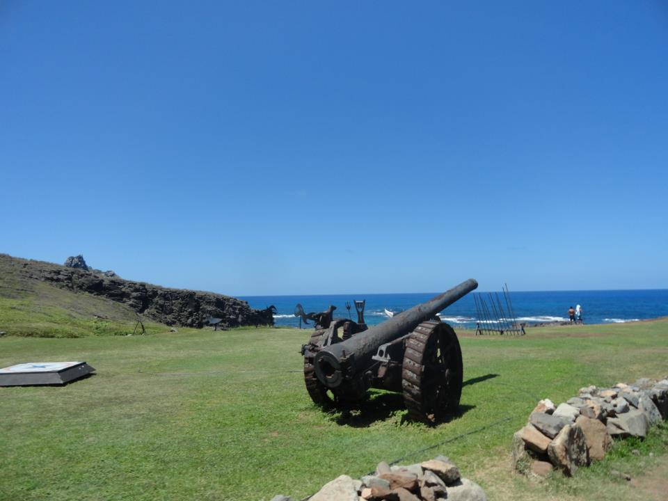 Canhão - antiga proteção de Fernando de Noronha